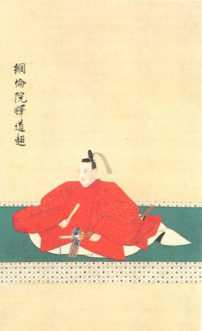 渡辺綱倫の肖像。